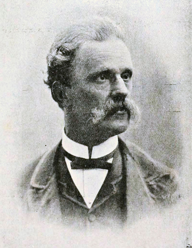 Gaetano Casati foto